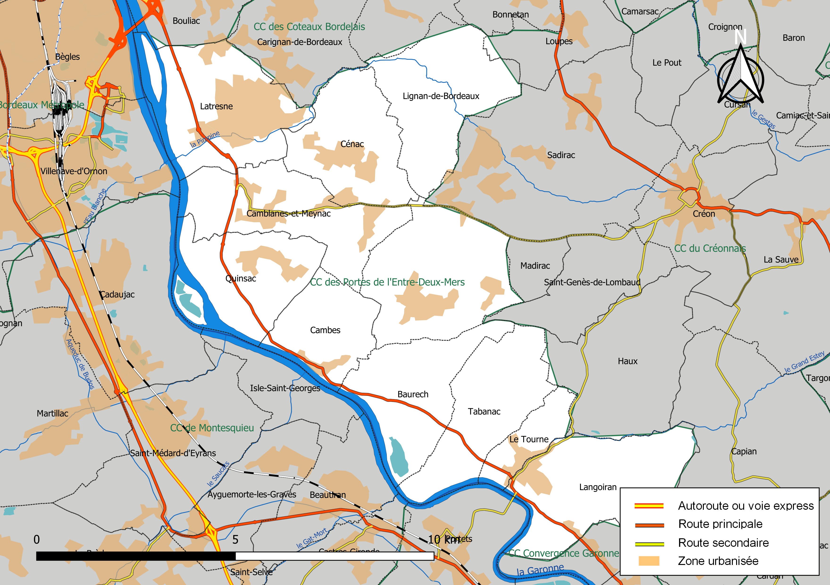 Carte géographique de la Communauté de communes des portes de l'Entre-deux-Mers, département de la Gironde, France. Composition au 1er janvier 2019.